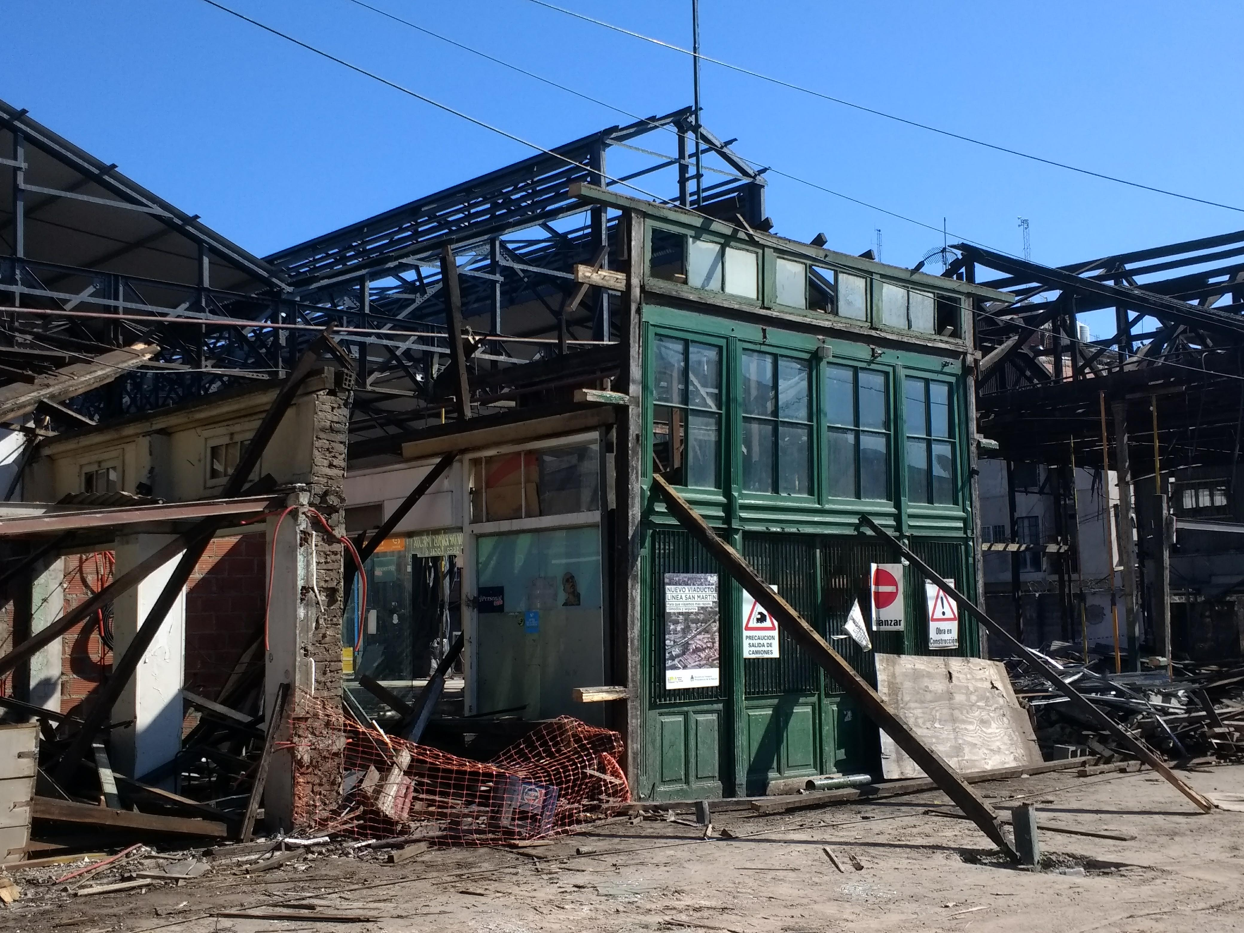 Obras de reconstrucción de la estación Retiro San Martín